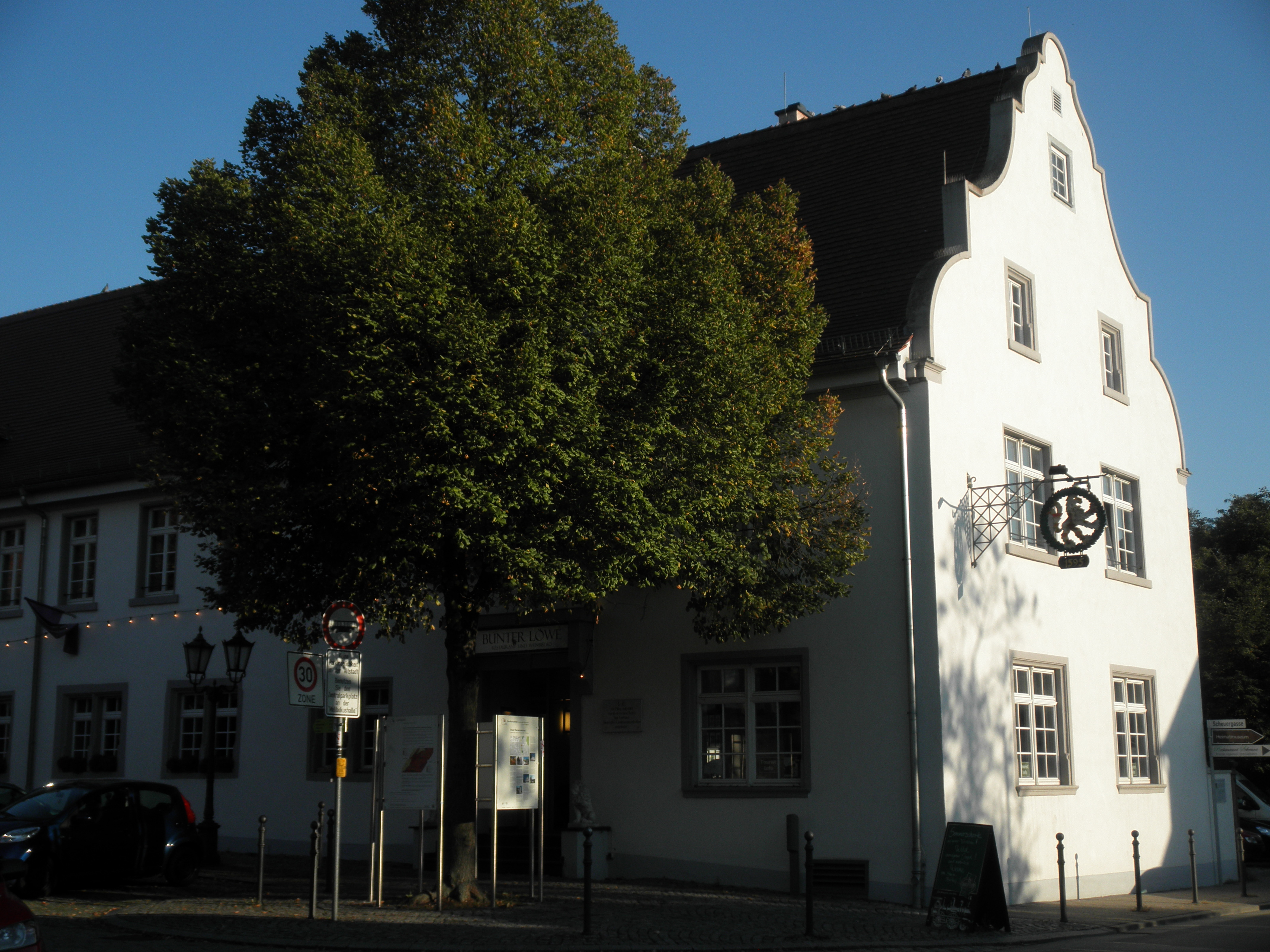 Zwingenberg: historia gastejo 'Zum Löwen' Löwenplatz 6 (monumenta n-ro Zwingenberg 38)